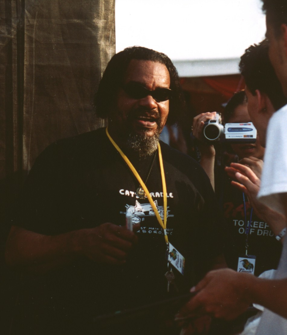 Ike Willis, Sänger und Gittarist, auf der Zappanale in Bad Doberan 2003